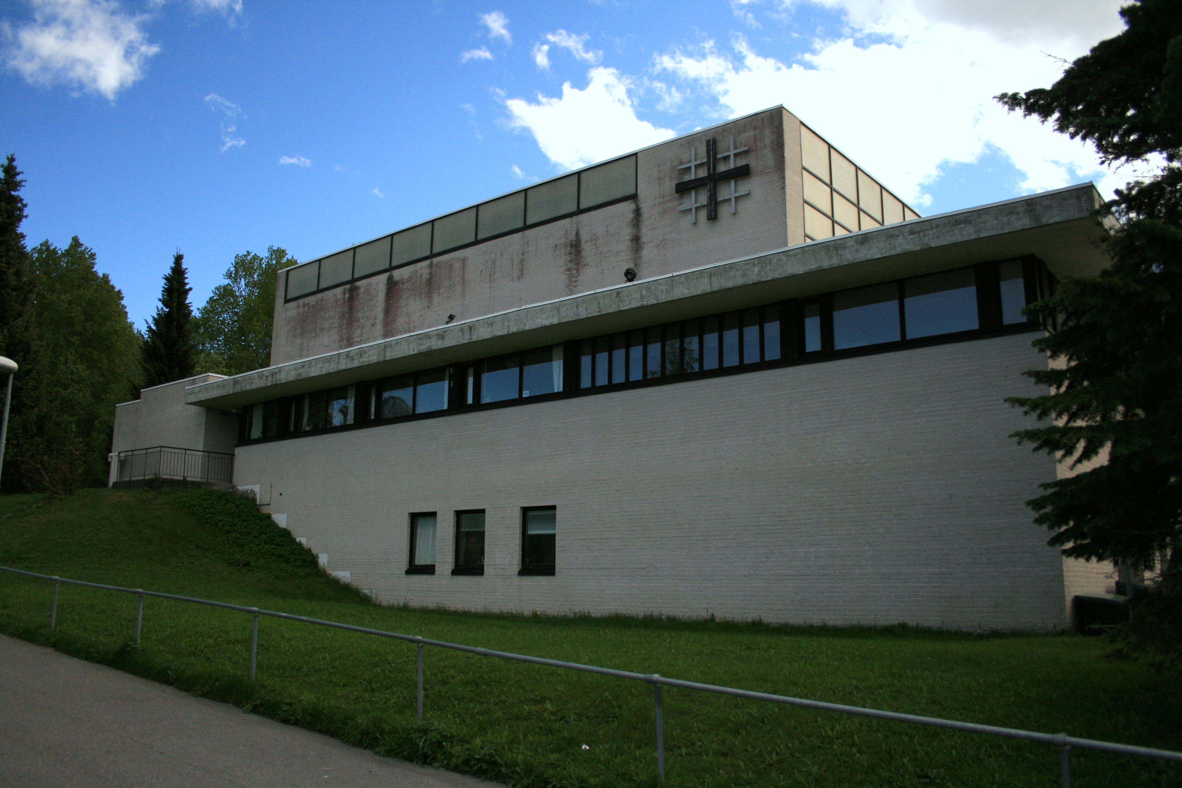 Norsk (bokmål): Haugerud kirke er en arbeidskirke fra 1975 i Oslo.